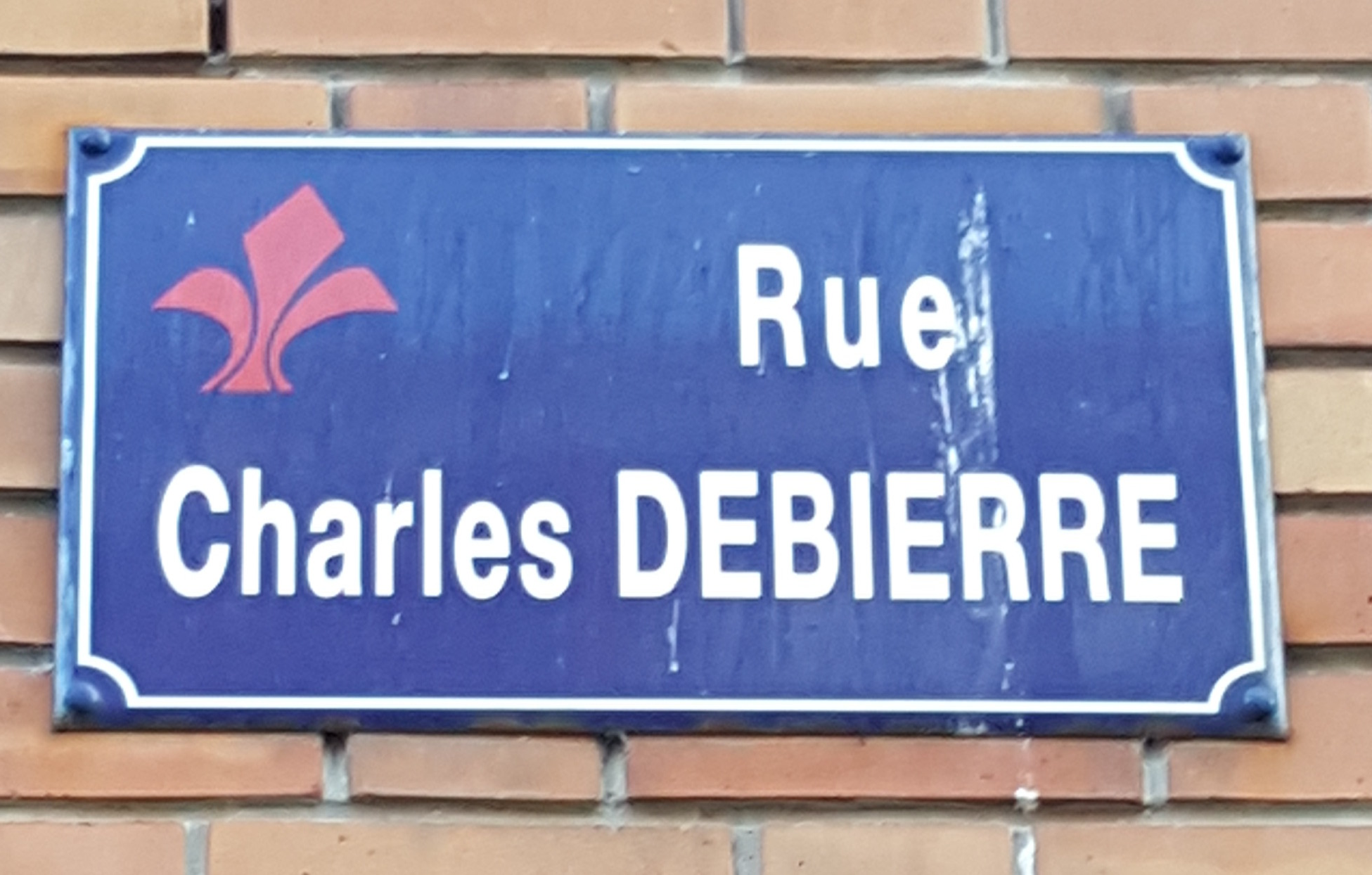 Plaque de rue